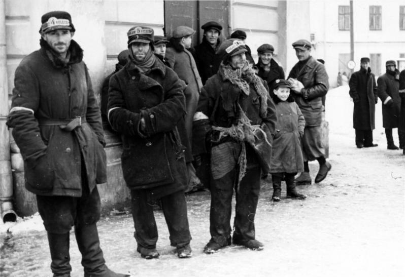 Polnische jüdische Gepäckträger am Bhf. (Bahnhof) in Kielce